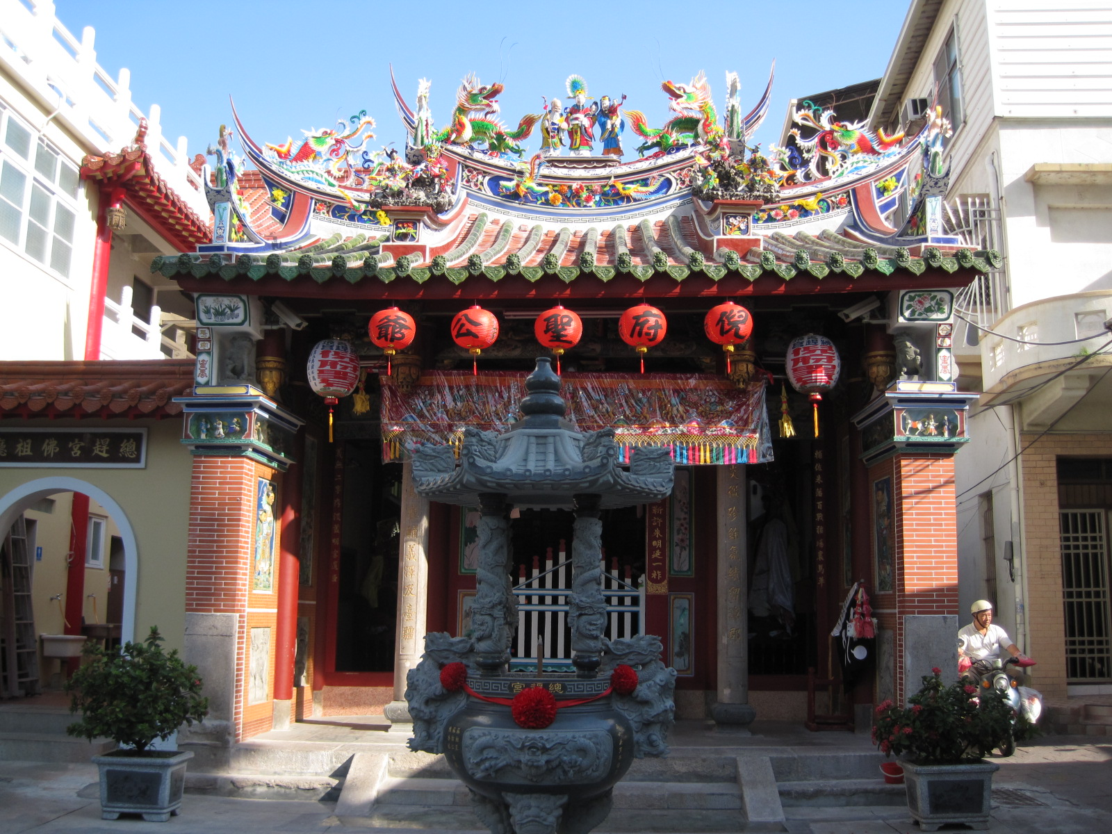 臺南總趕宮整修後的外觀